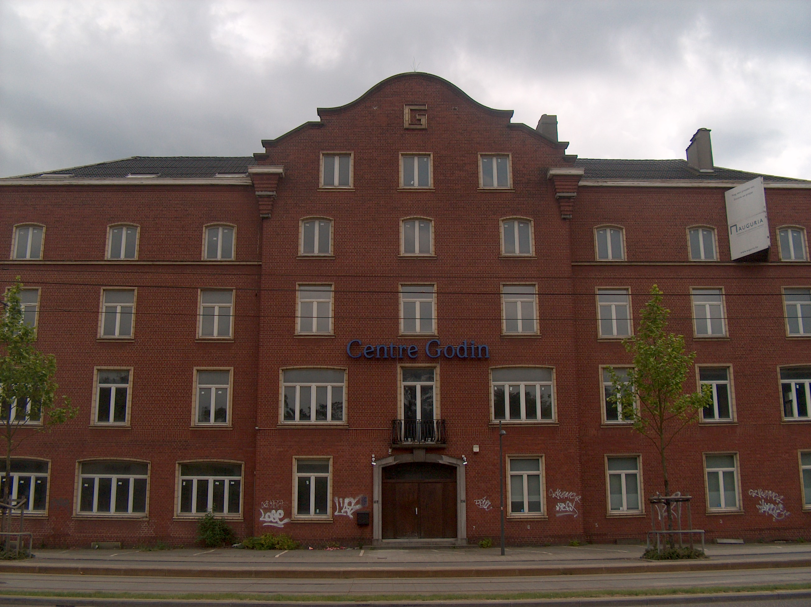 Le quai des Usines à Bruxelles, Belgique. Object location50° 52′ 44.68″ N, 4° 22′ 15.79″ E